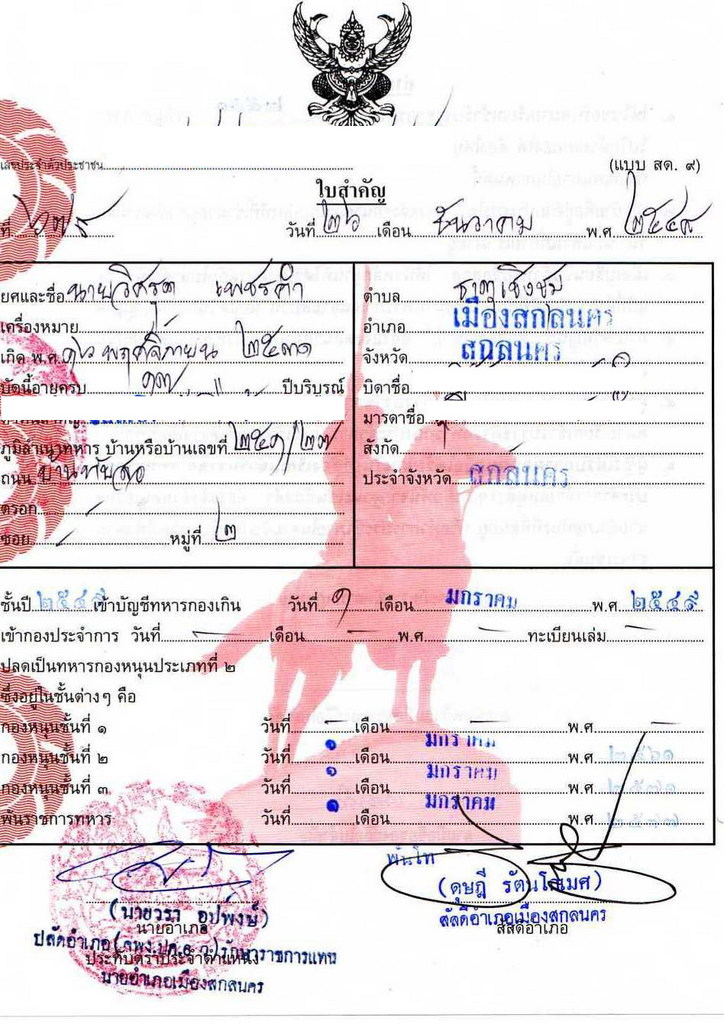 ใบสำคัญ สด.๙ แสดงการขึ้นทะเบียนเป็นทหาร